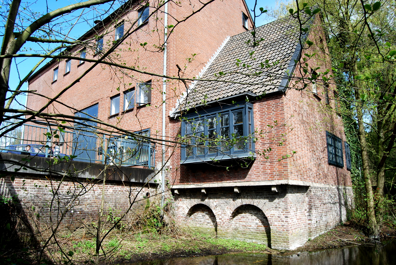 Radhaus und Halle der ehemalige Mühle Asperden